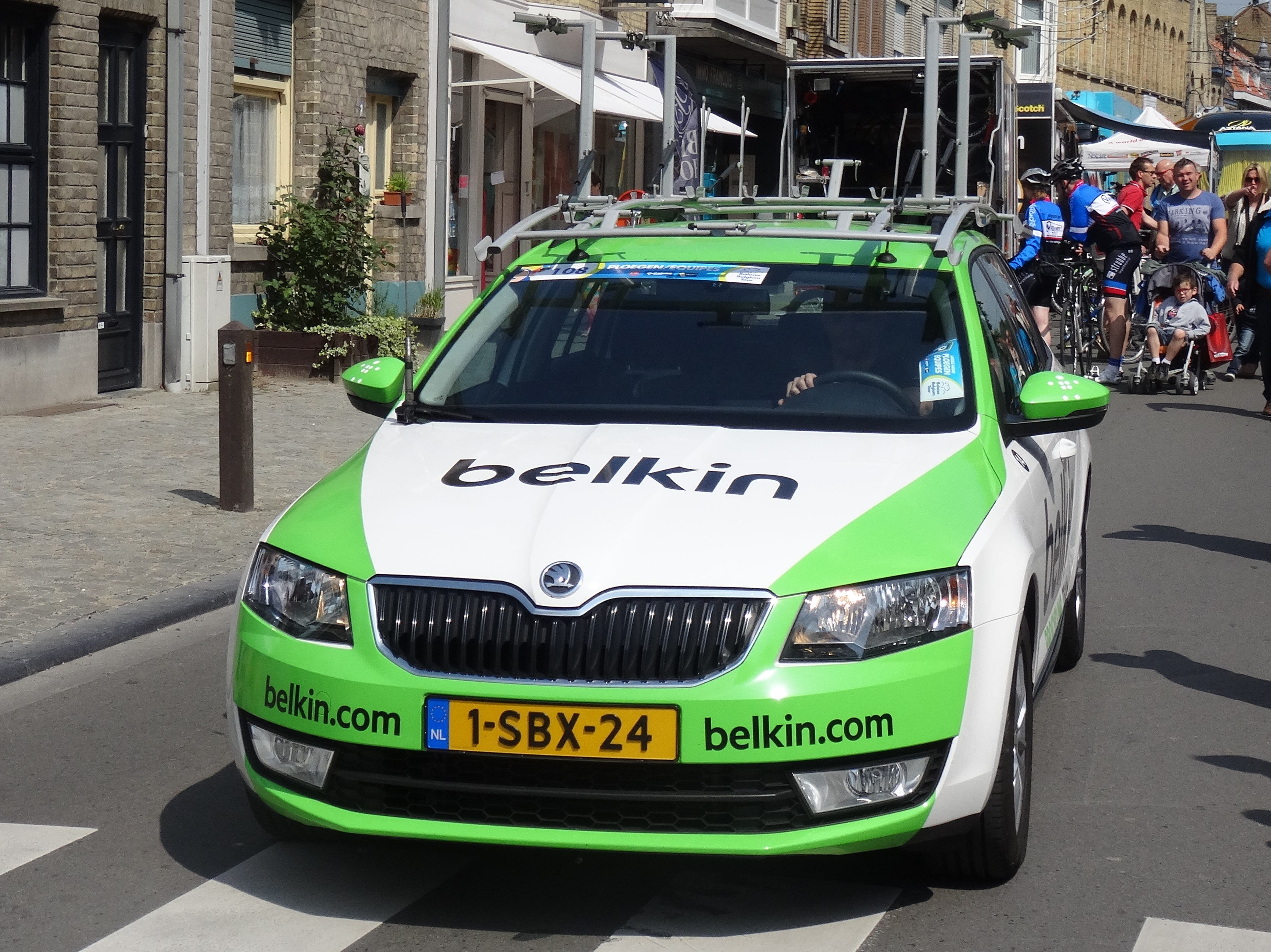 Reportage photographique réalisé le vendredi 30 mai à l'occasion du contre-la-montre individuel de la troisième étape du Tour de Belgique 2014 à Dixmude, Belgique.